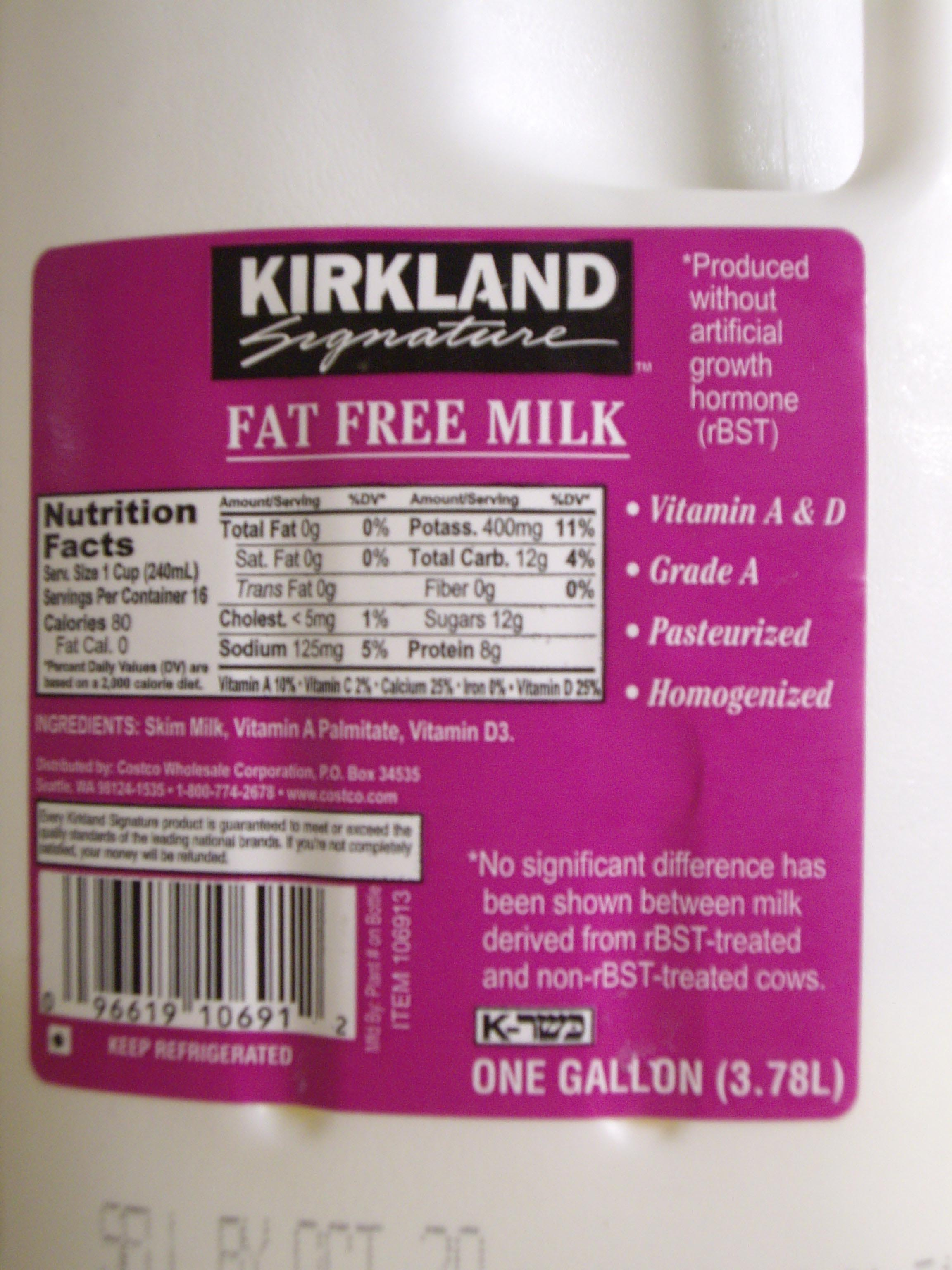 Etiqueta de llet de vaca no tractada amb hormona recombinant, als EEUU